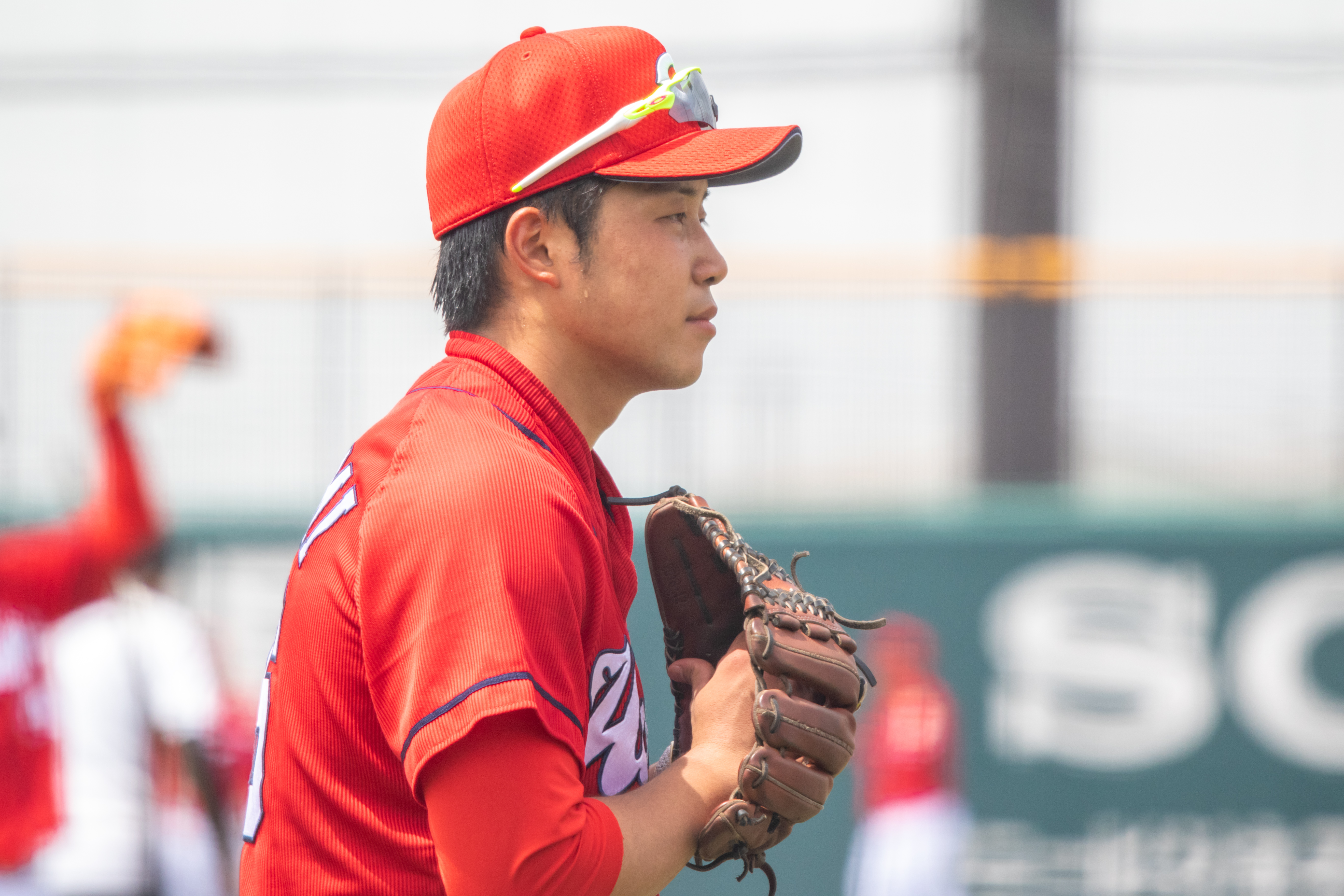 2019/4/16 タマホームスタジアム筑後